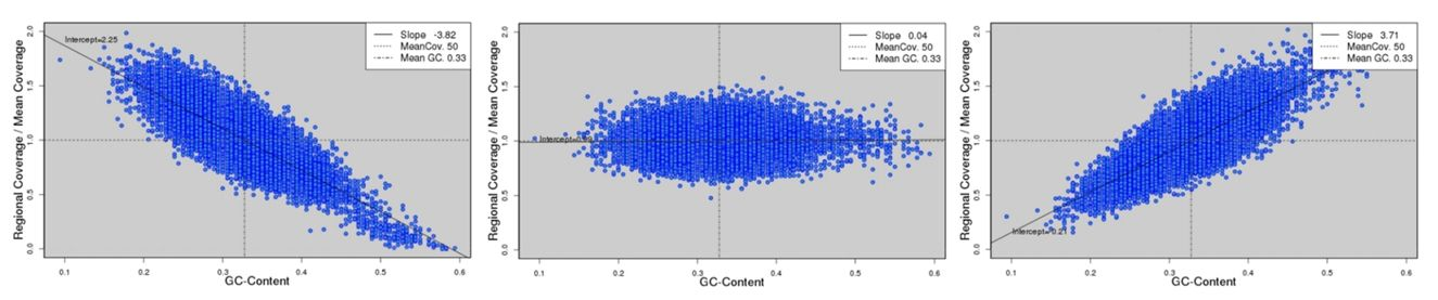 Grafikai GC tendencingumui stebėti.